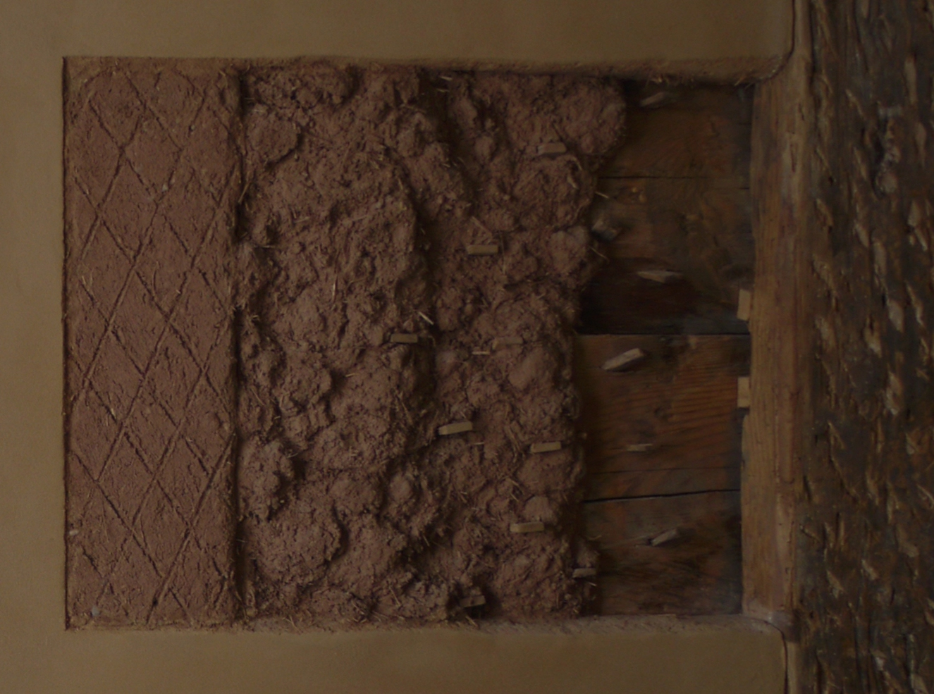 Bohlenwand mit Lehmputz